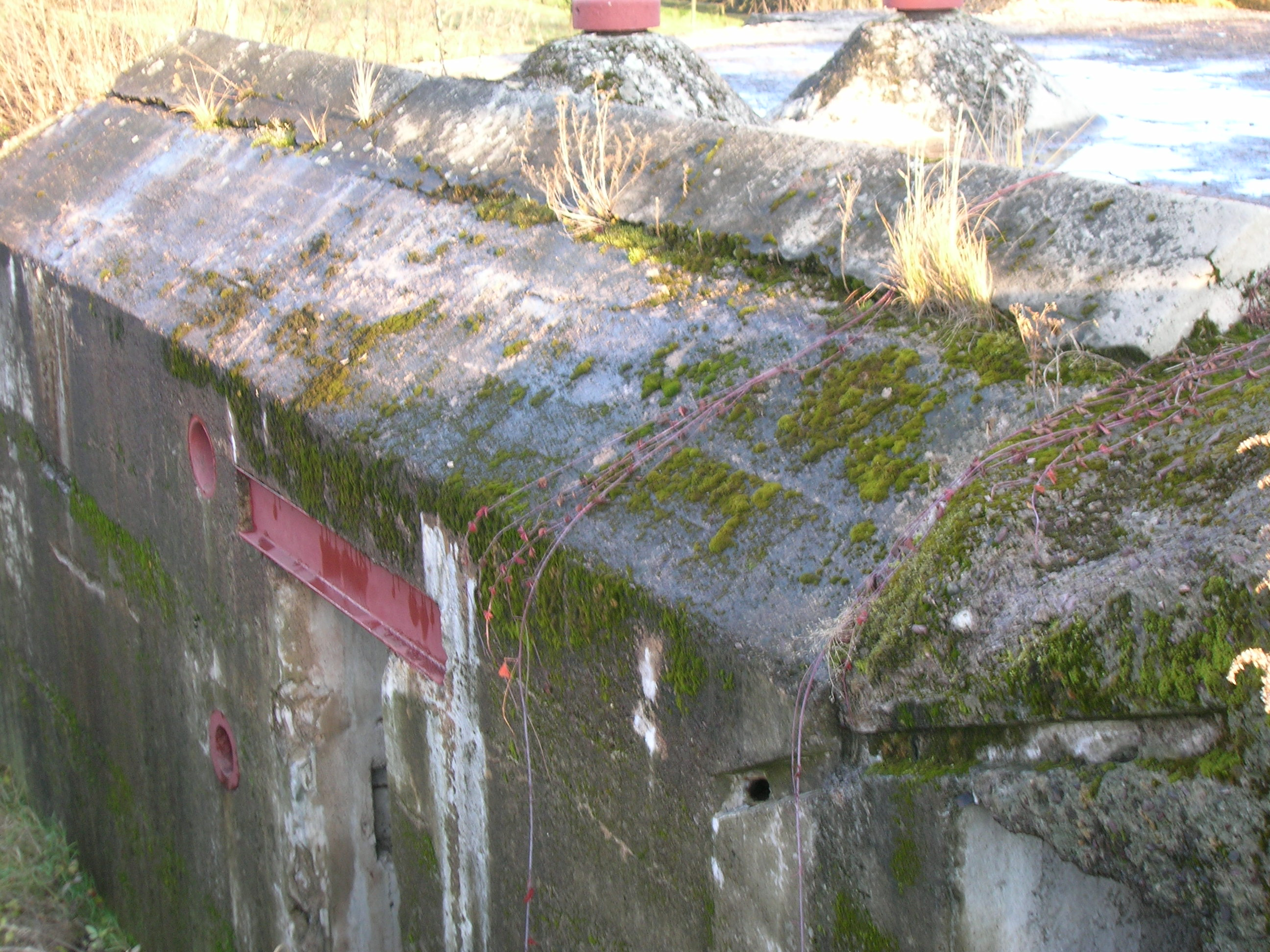 Bunkier.Młynka